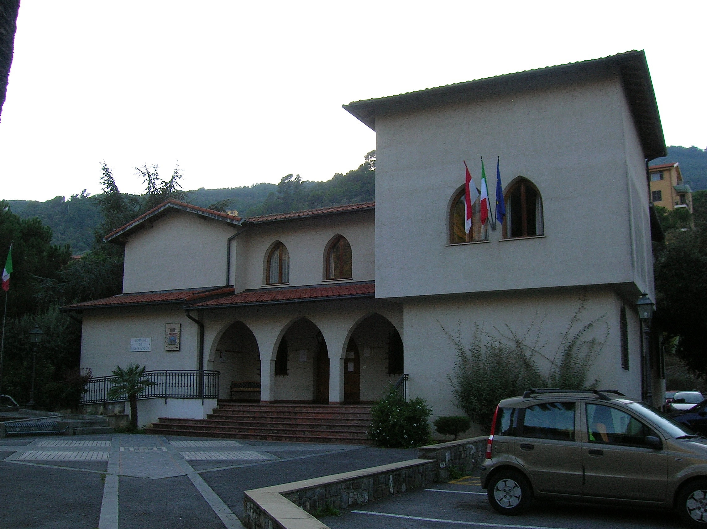 municipio Dolceacqua, Liguria, Italia.